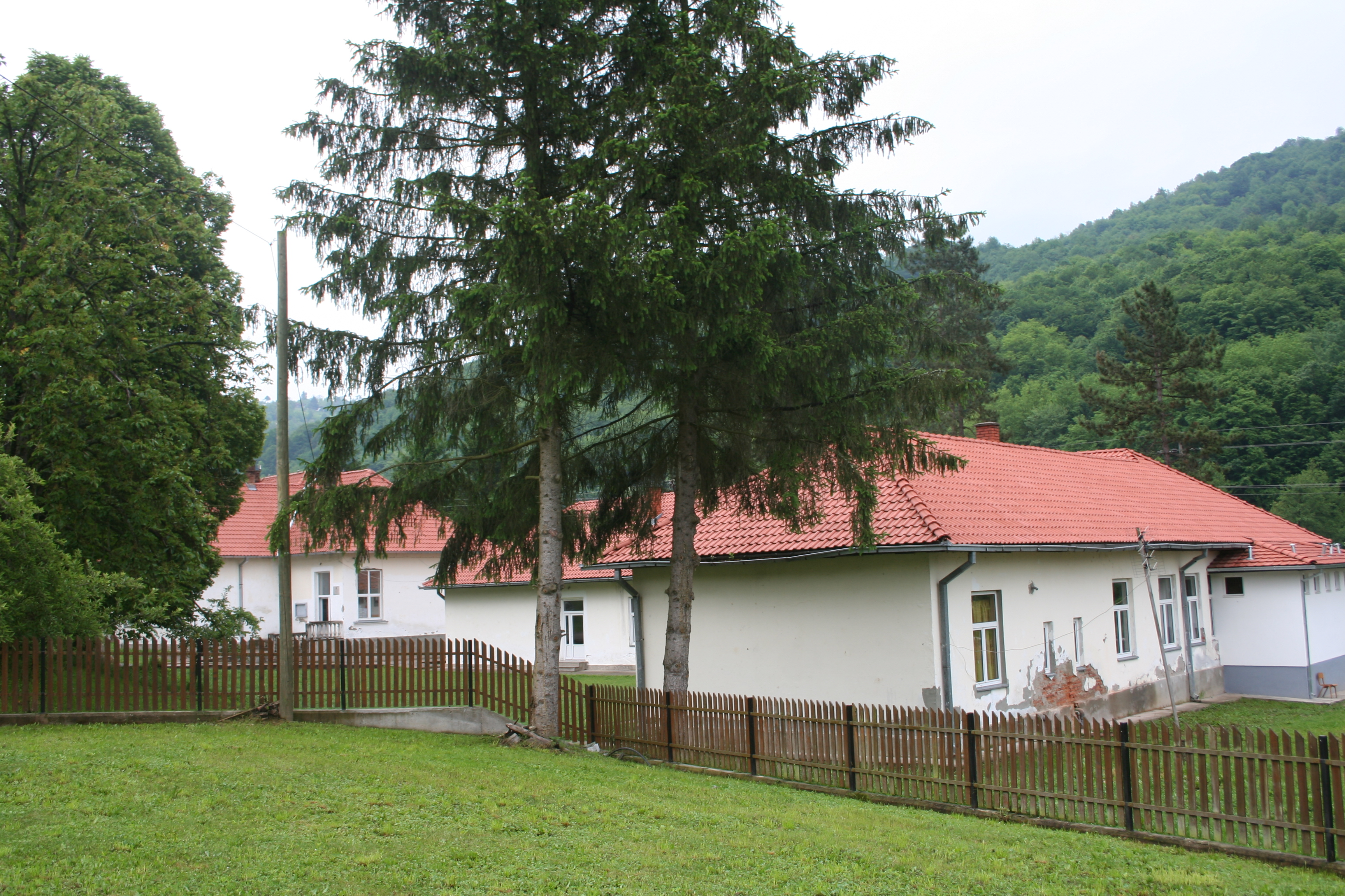 Škola u Donjoj Ljuboviđi